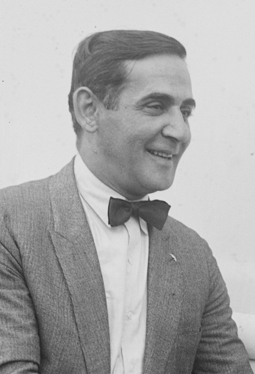 Actor Eddie Polo